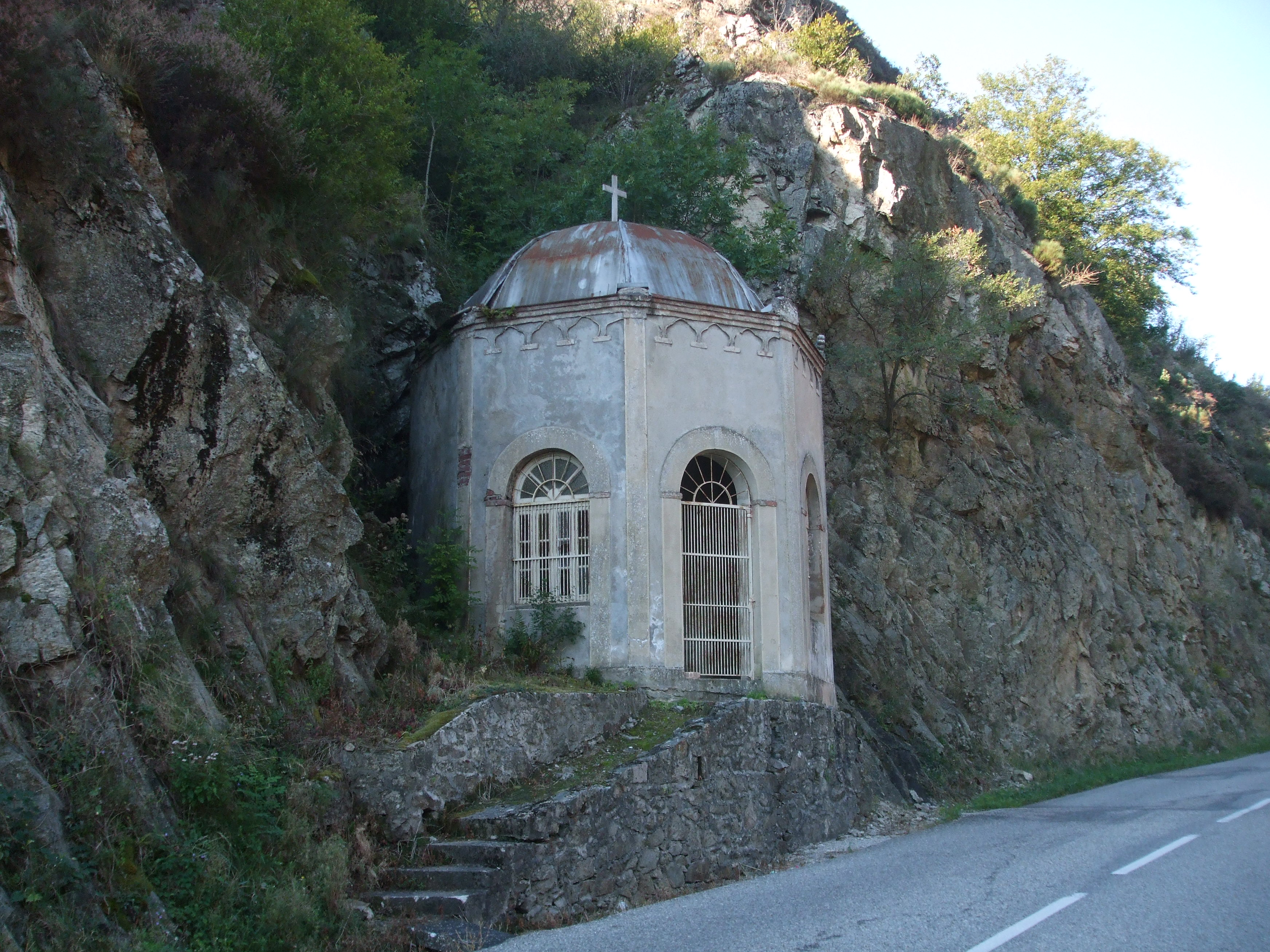 chapelle Notre Dame de Bonne Espérance dans les gorges de l'Ay (Sarras)